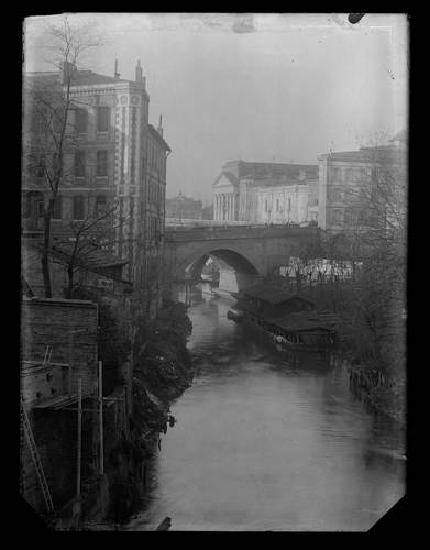 La Garonnette entre le pont et le quai de Tounis. Entre 1899 et 1907. Vue plongeante prise depuis le pont. Au premier plan le canal et les bâtiments qui l'entourent ; au second un bateau-lavoir, linge étendu, l'arche du quai de tounis ; au fond façade de l'Ecole des Beaux-Arts et de l'église Notre-Dame-de-la-Daurade.